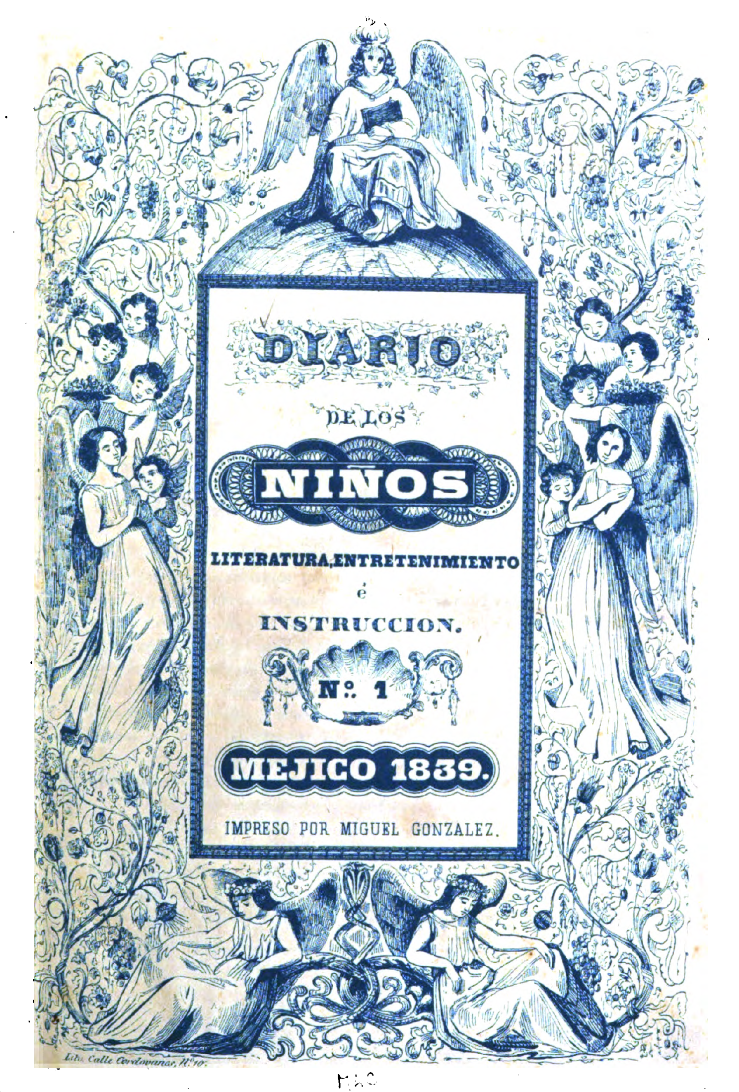 Portada del Diario de los niños, publicación periódica mexicana del siglo XIX digitalizada por Google books